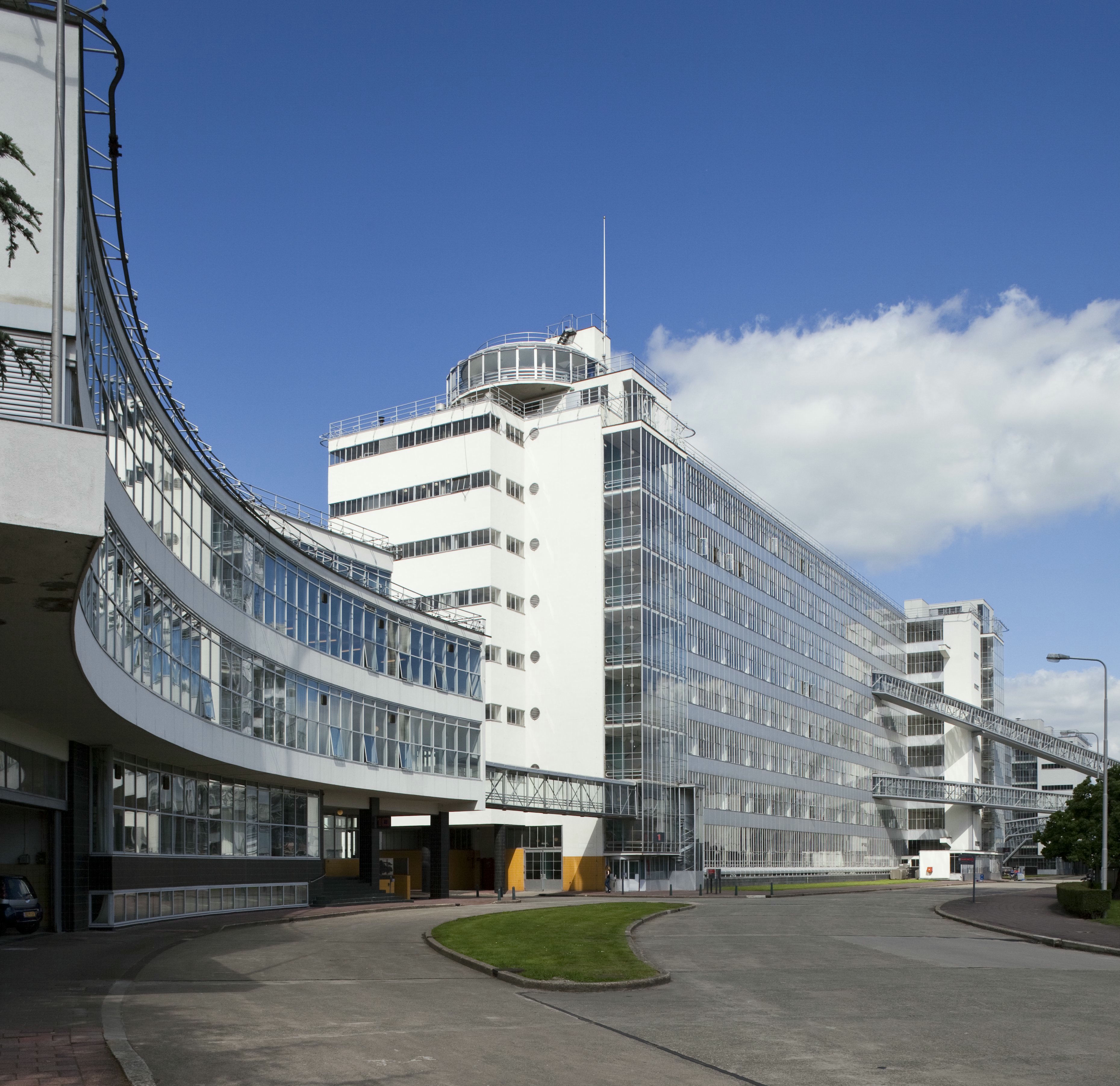 (voormalige) Van Nellefabriek, - Fabriekscomplex: Overzicht voorgevel van de fabriek: kantoorgebouw en tabaksfabriek